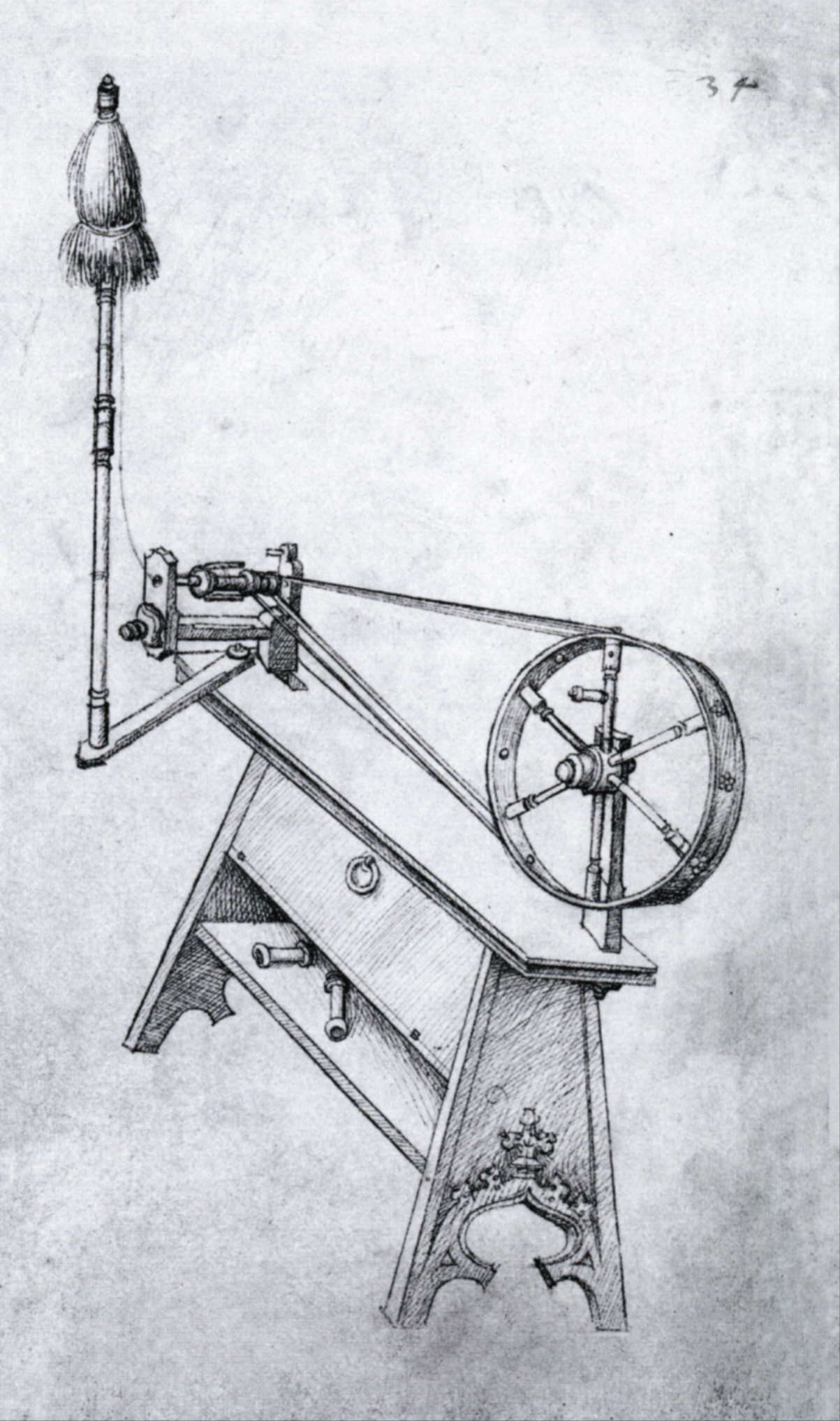 Mittelalterliches Hausbuch von Schloss Wolfegg Fol. 34r: Das Spinnrad